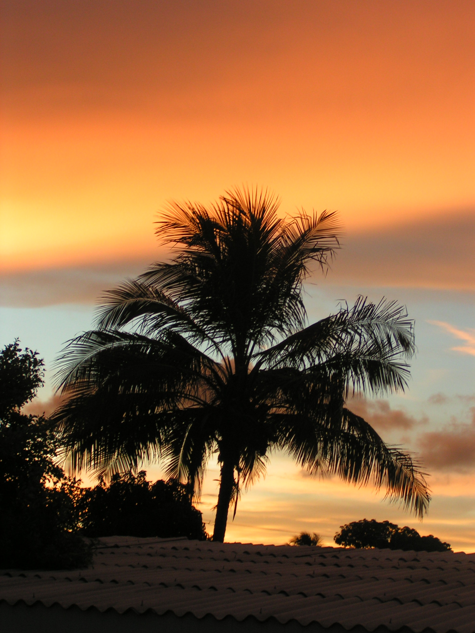 Sonnenuntergang in Santa Clara, Kuba